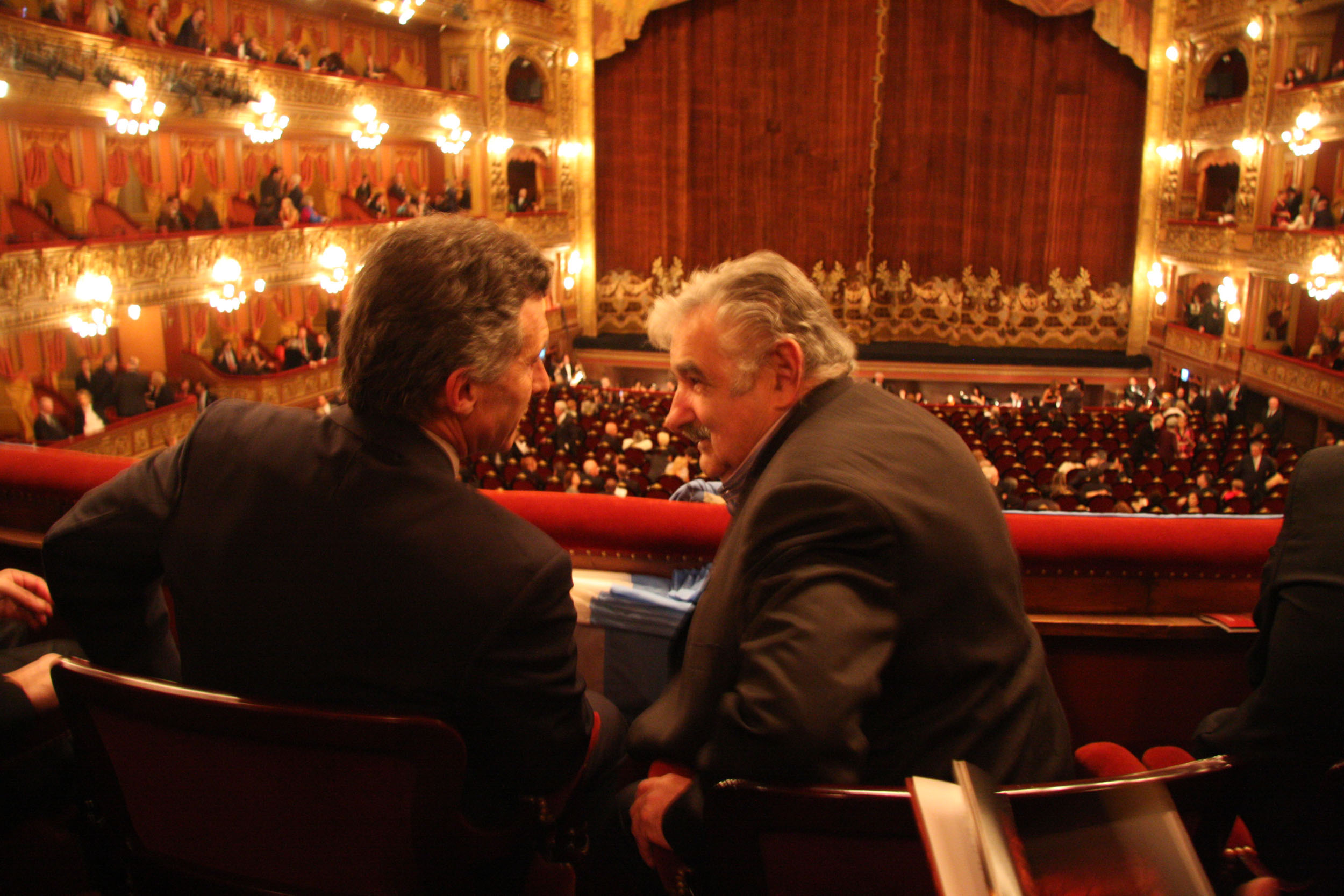 El Jefe de Gobierno porteño, Mauricio Macri, conversa en el palco oficial con el Presidente de Uruguay, José Mujica durante la presentación de la gala del Taetro Colón como motivo de su reinauguración.